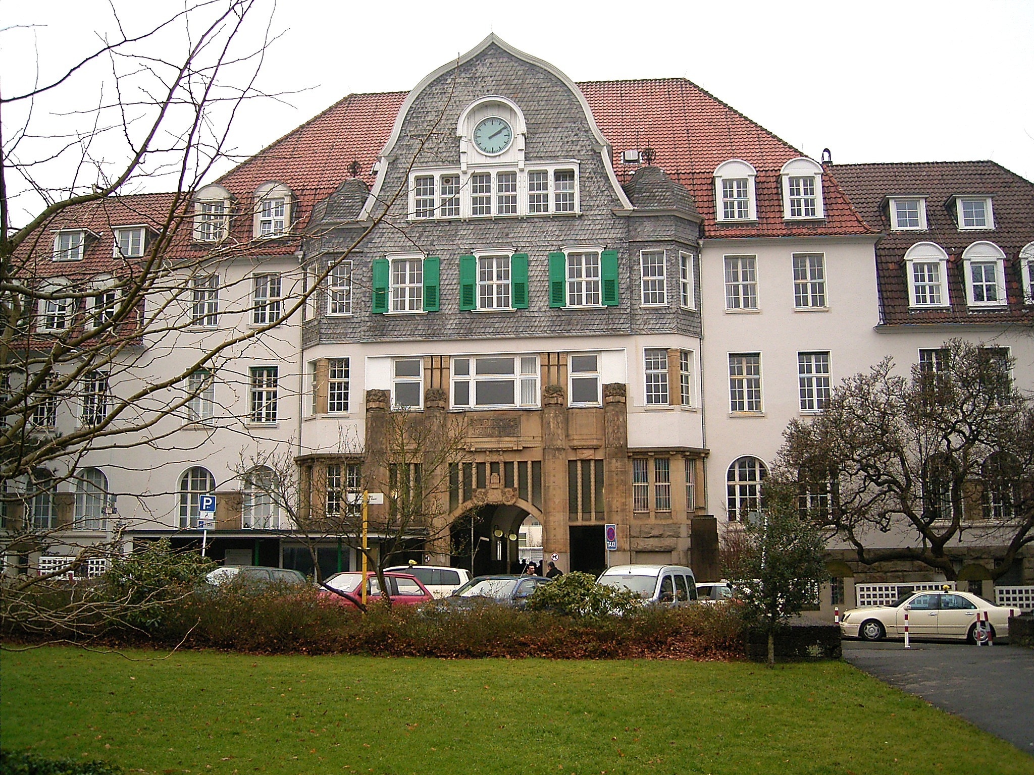 Wuppertal-Barmen, Helios Klinikum